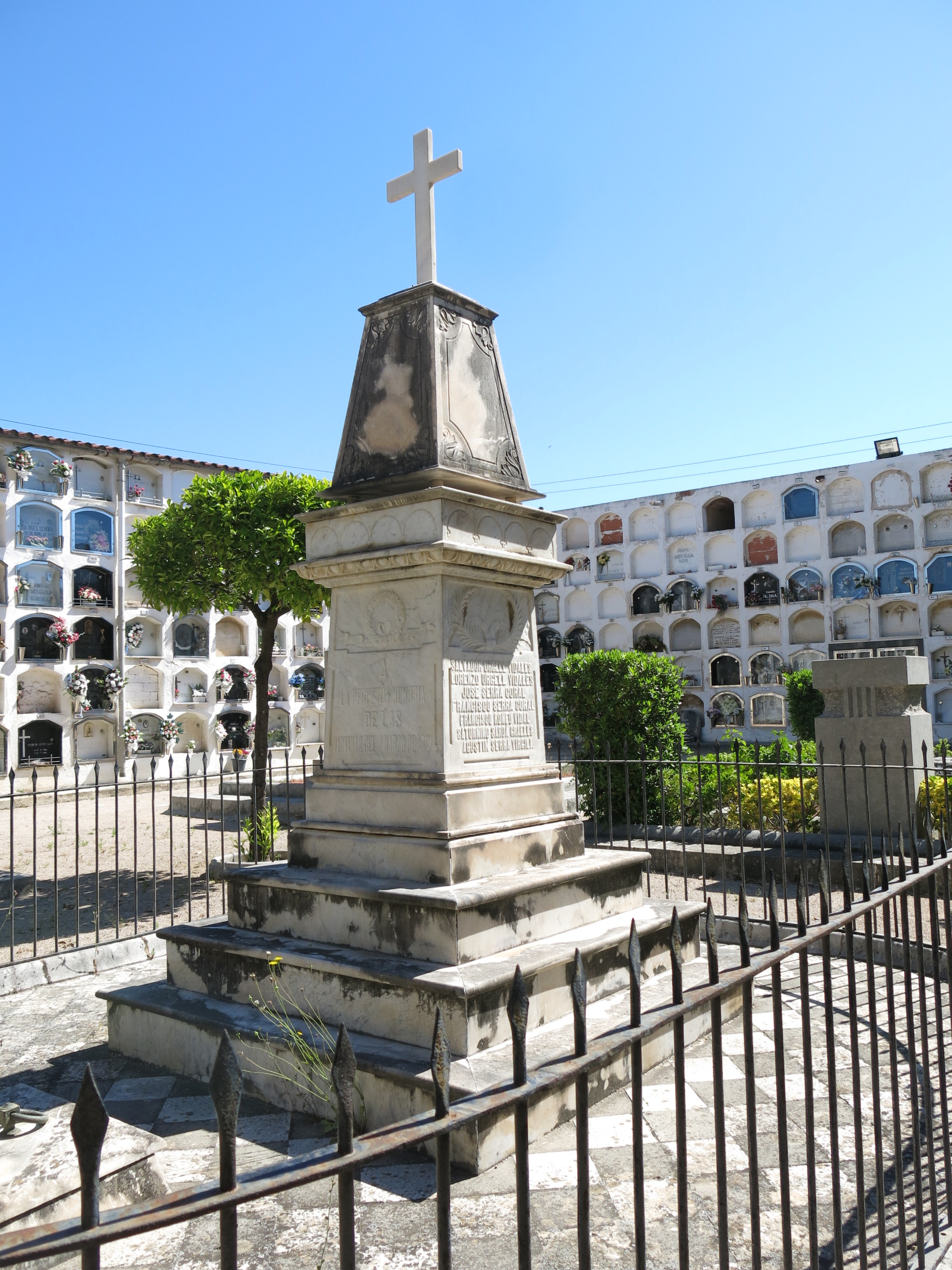 Cementiri del Vendrell